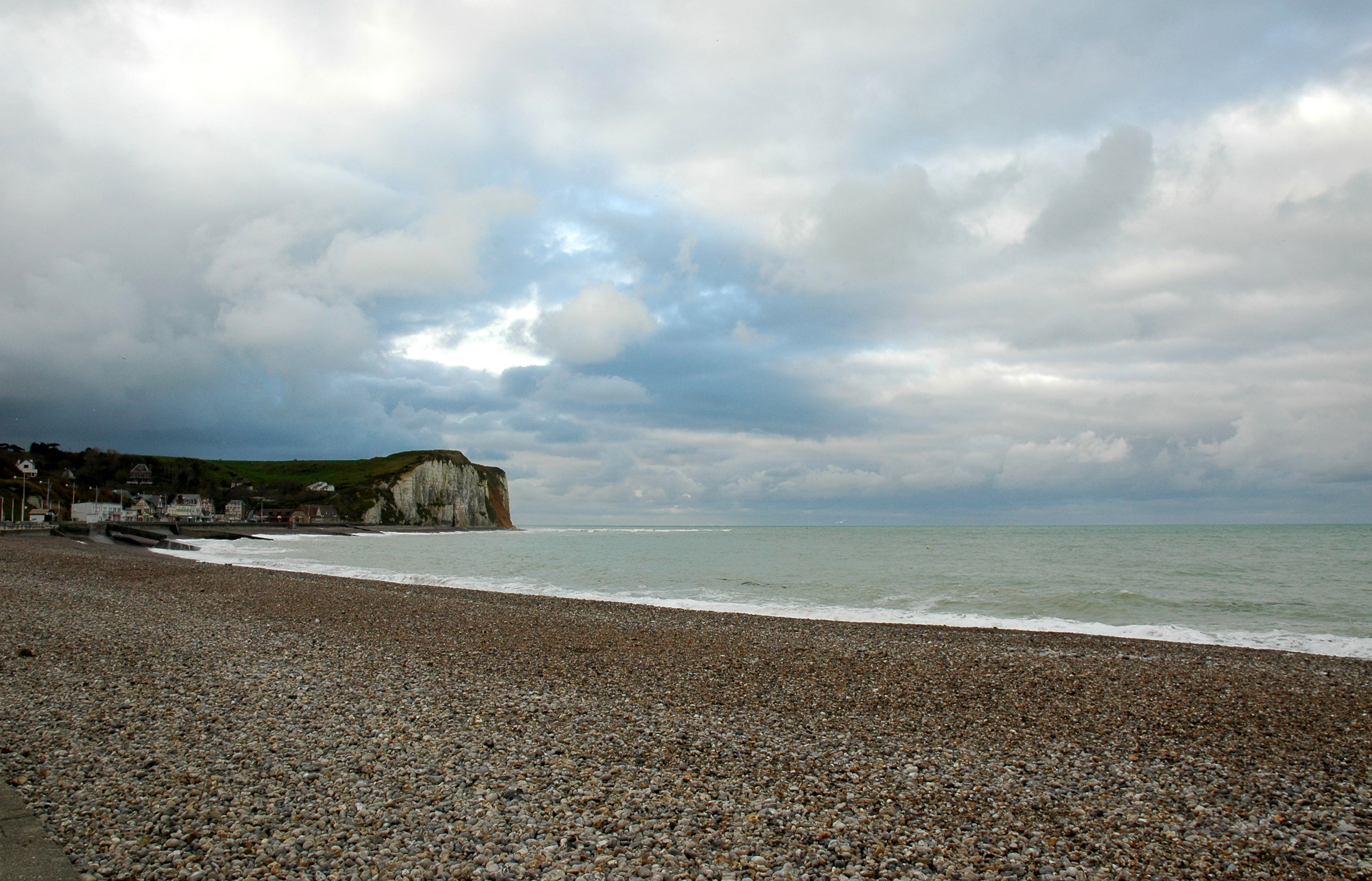 Veulettes-sur-Mer (Seine-Maritime, France) - La plage.